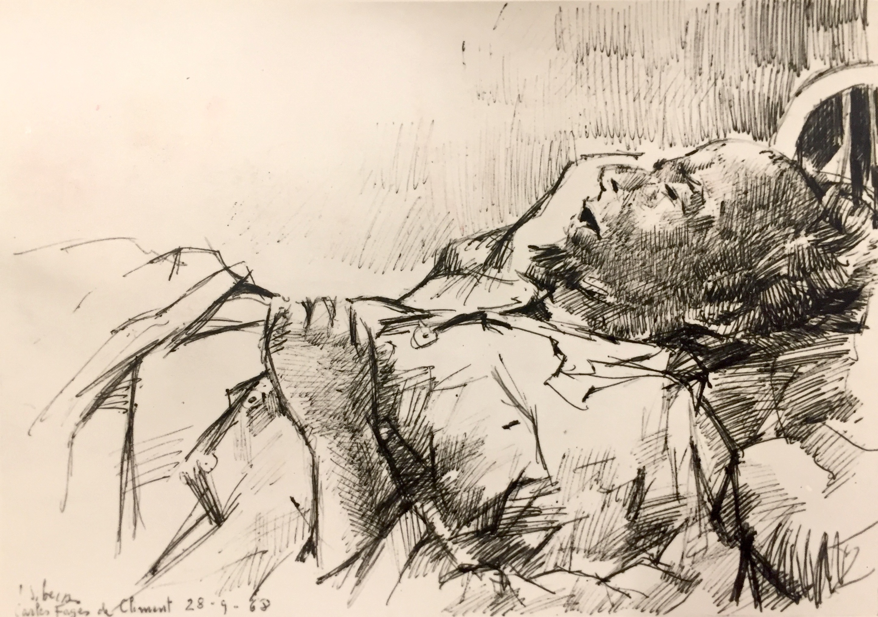 Fages de Climent moribund dibuixat per Joan Sibecas